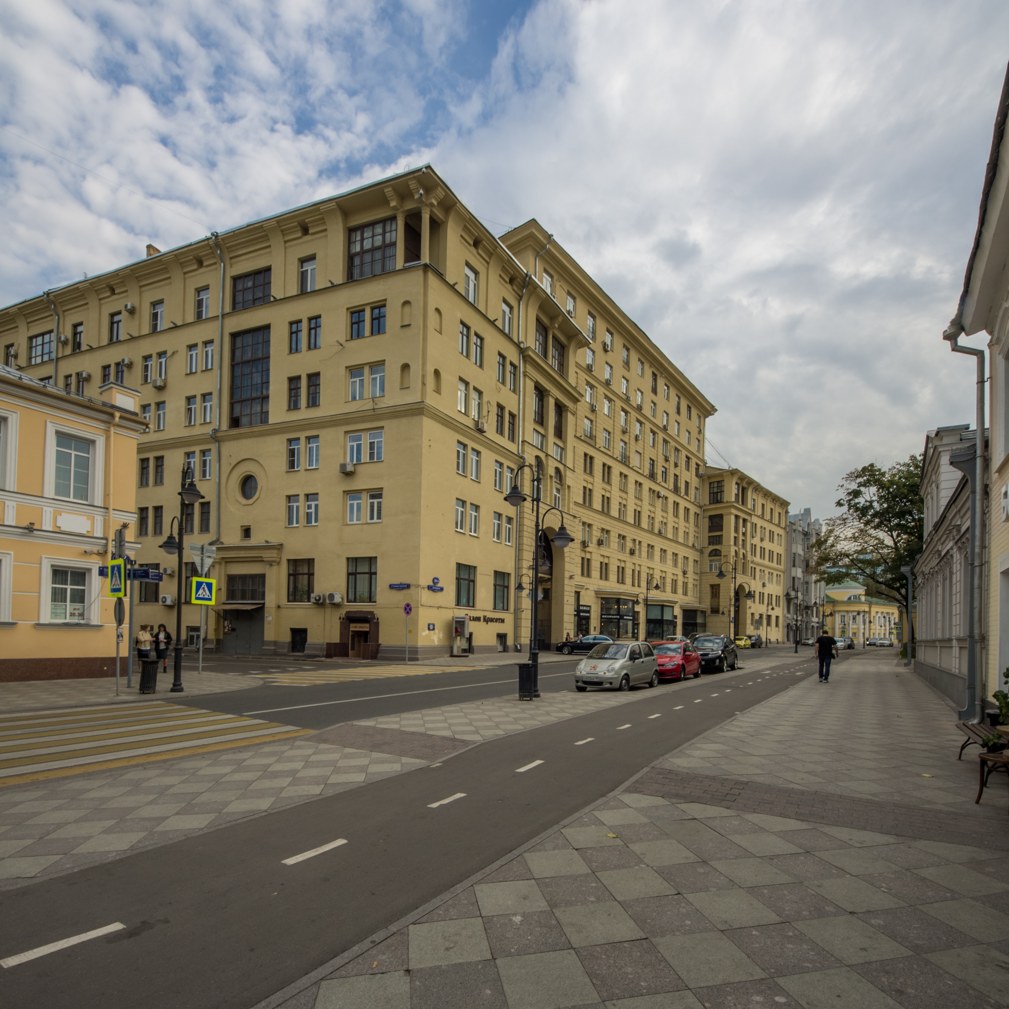 Жилой дом для рабочих московского завода Геодезия: Пятницкая ул., дом 59/19, строение 5, Замоскворечье, Центральный округ, Москва